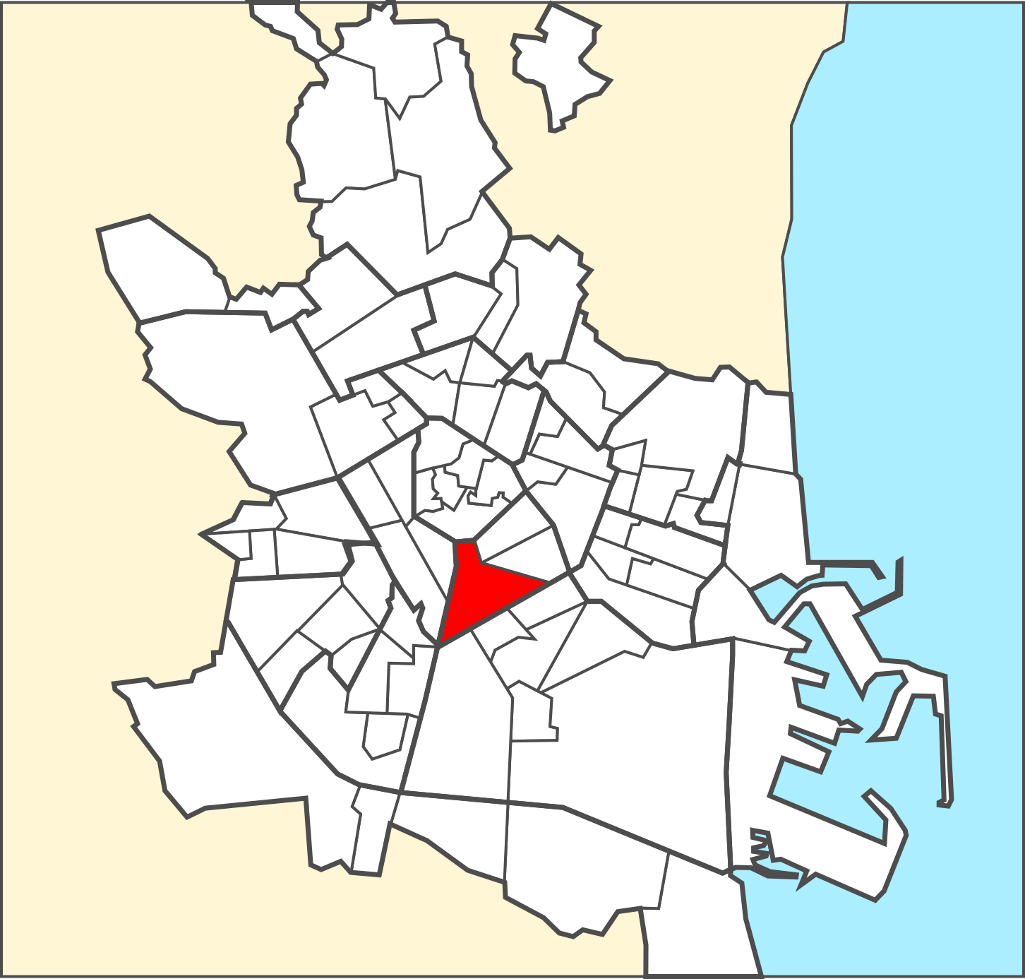 Localització del barri dins de la ciutat de València.